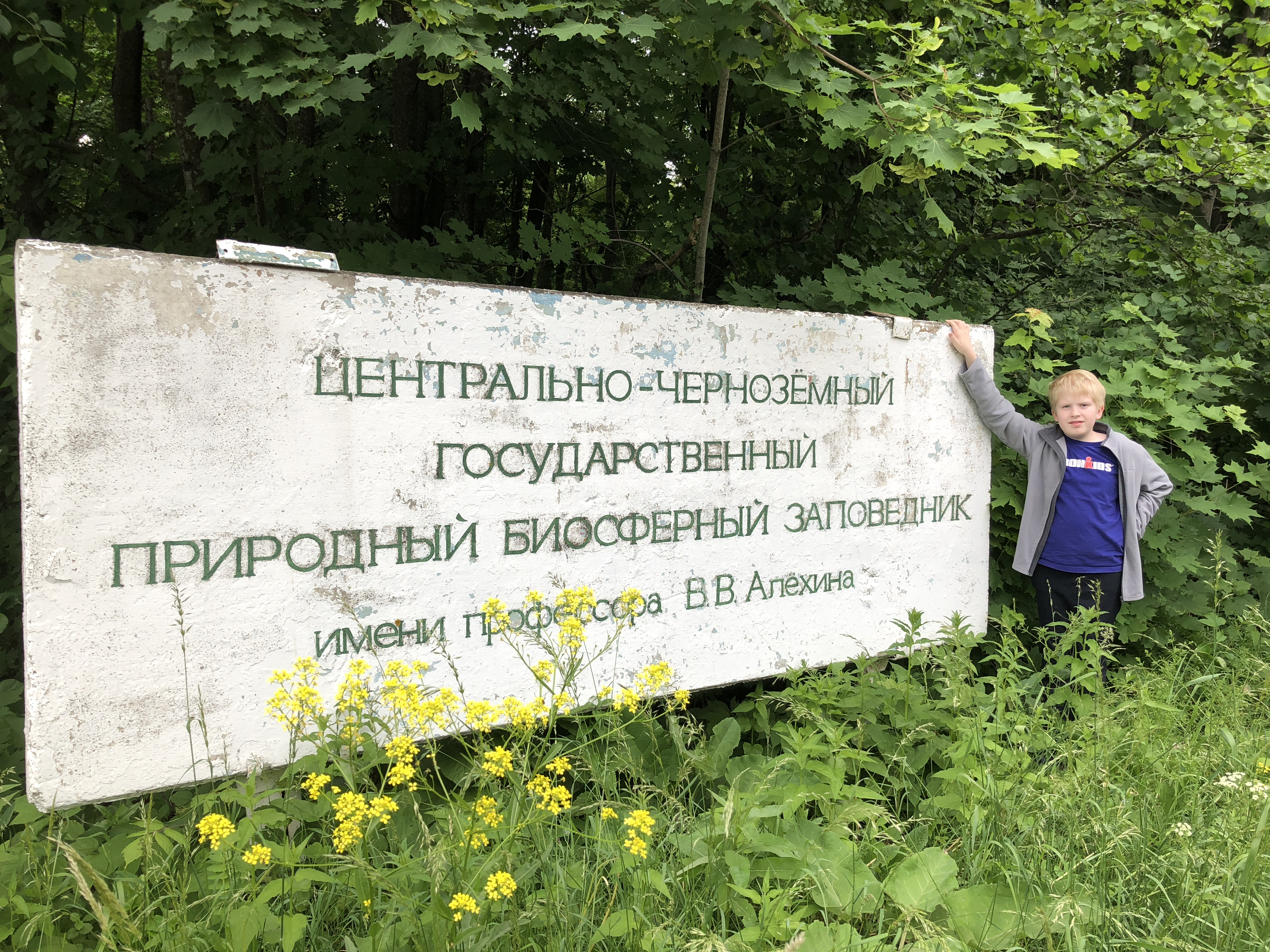 Meadow steppe, Kursk region